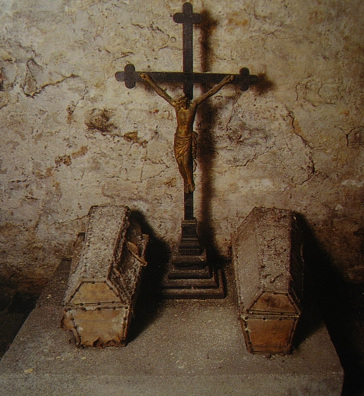 Krypty w podziemiach klasztoru w Wejherowie